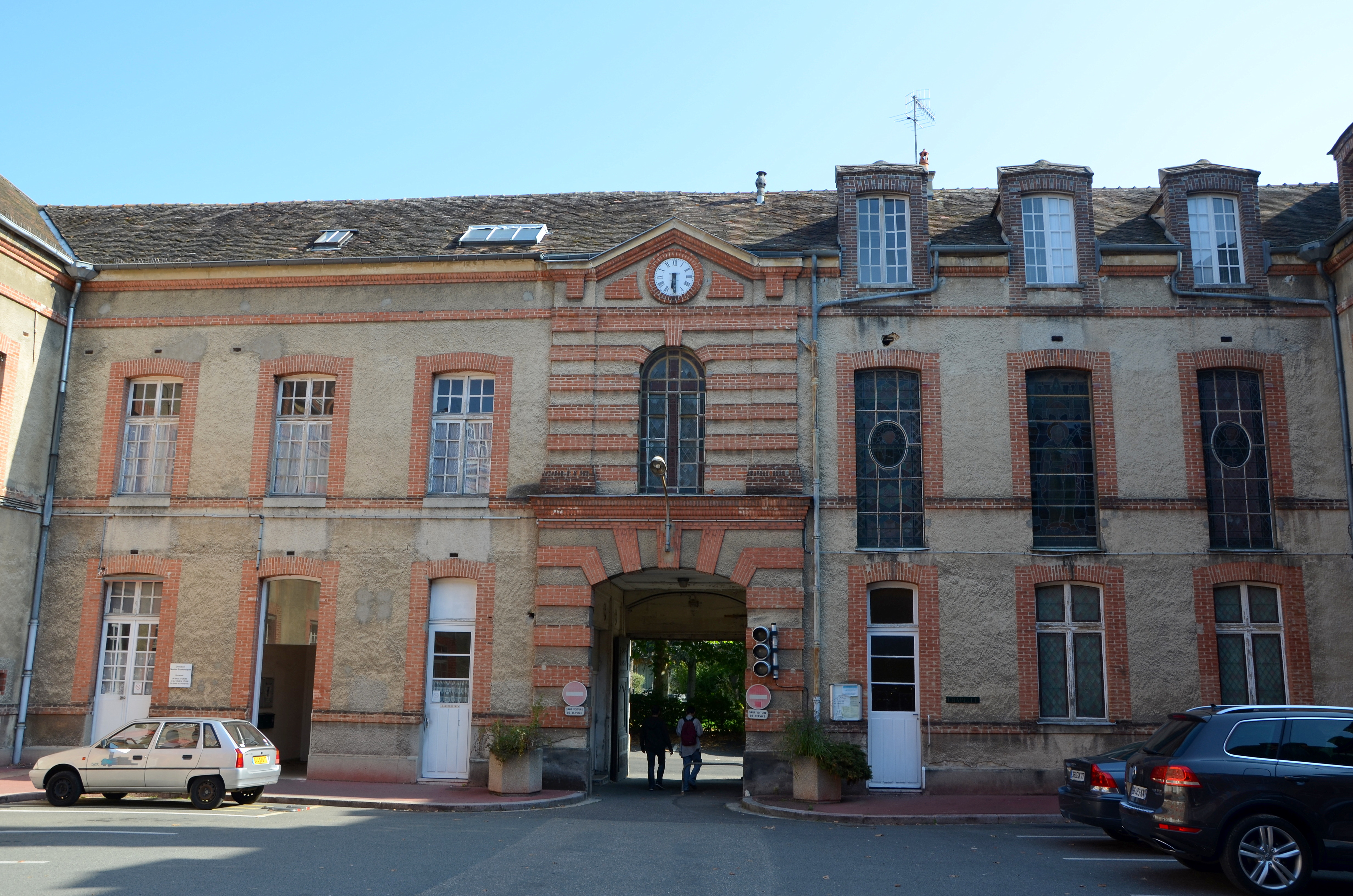 Hôpital de Fontainebleau (Seine et Marne, Ile de France, France). Les bâtiments protégés sont ceux entourant la première cour ; ils sont de la 2e moitié du 17e siècle. .